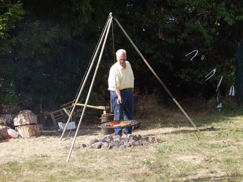 Typischer saarländischer "Schwenker": Dreibein mit einem Rost, der über dem Feuer aufgestellt wird. Schwenkbraten, Rostwürste, Lyoner werden so gegrillt. Die Beizeichnung "Schwenker" kommt daher, dass der Rost über dem Feuer, bzw. der Glut hin und her geschwenkt und gedreht wird.